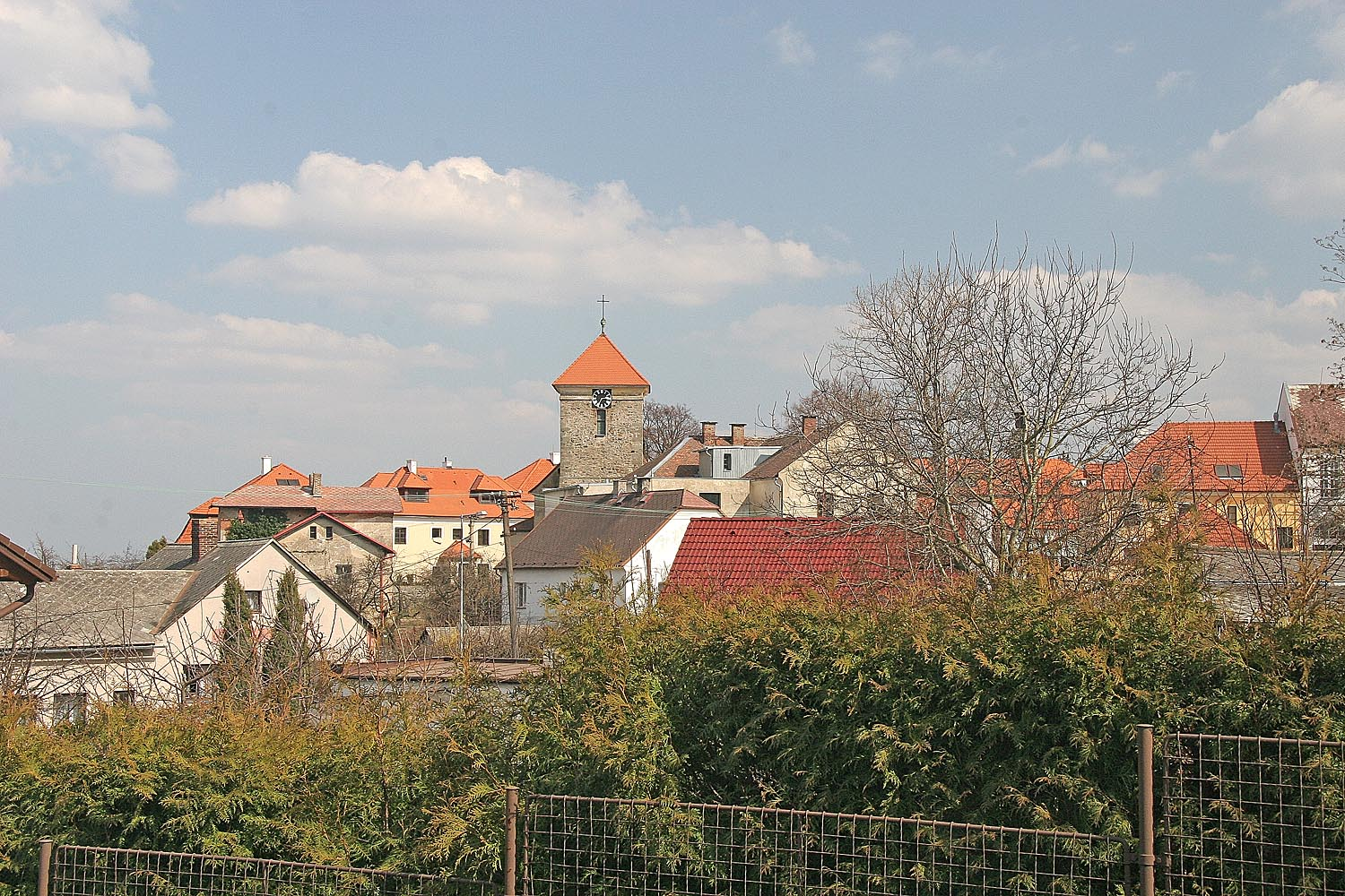 Věž kostela svatého Jiljí v městečku Nasavrky, district Chrudim autor:Prazak datum: 1. 4. 2007